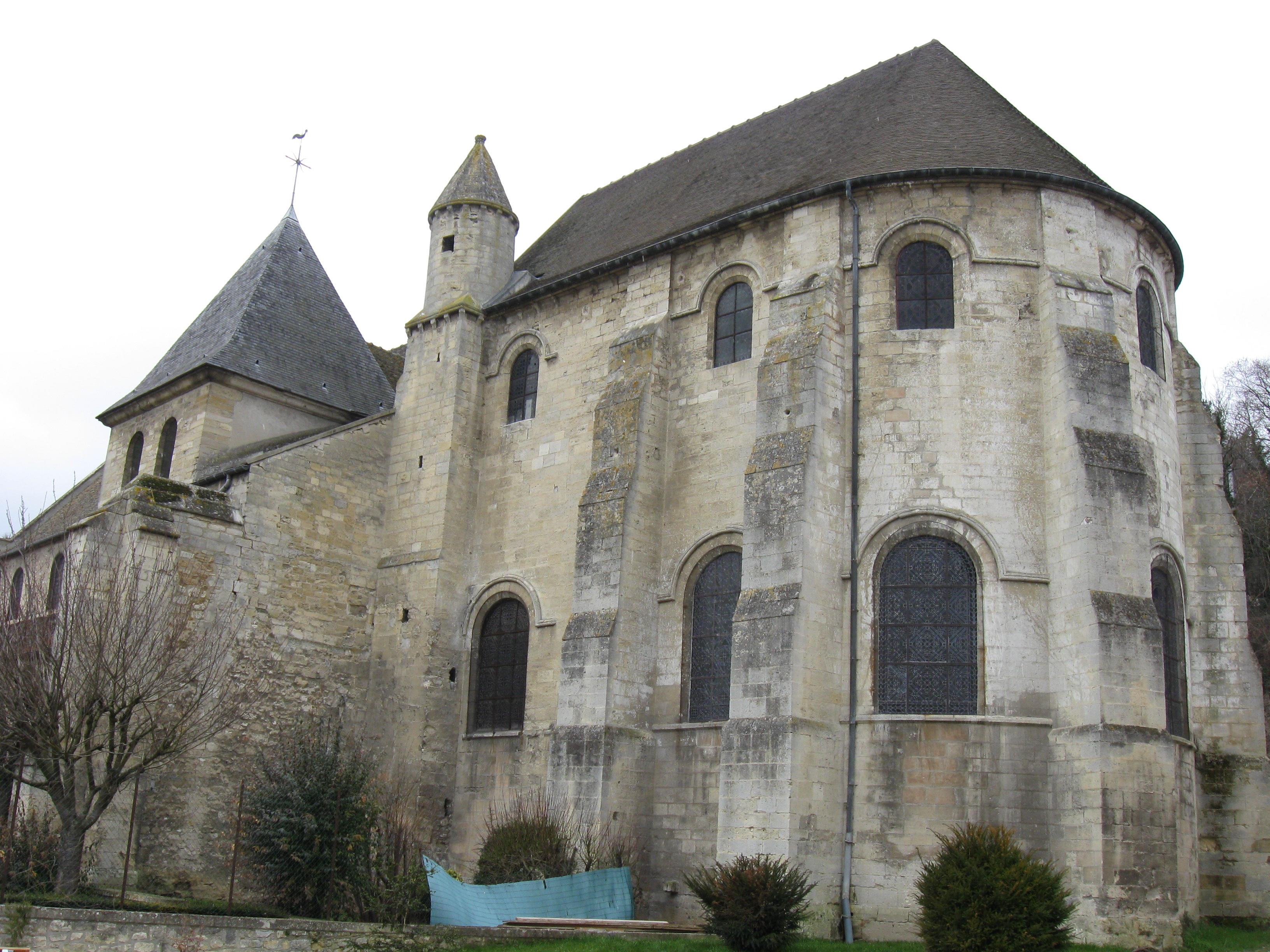 Église Saint-Michel de Juziers. (département des Yvelines, région Île-de-France).